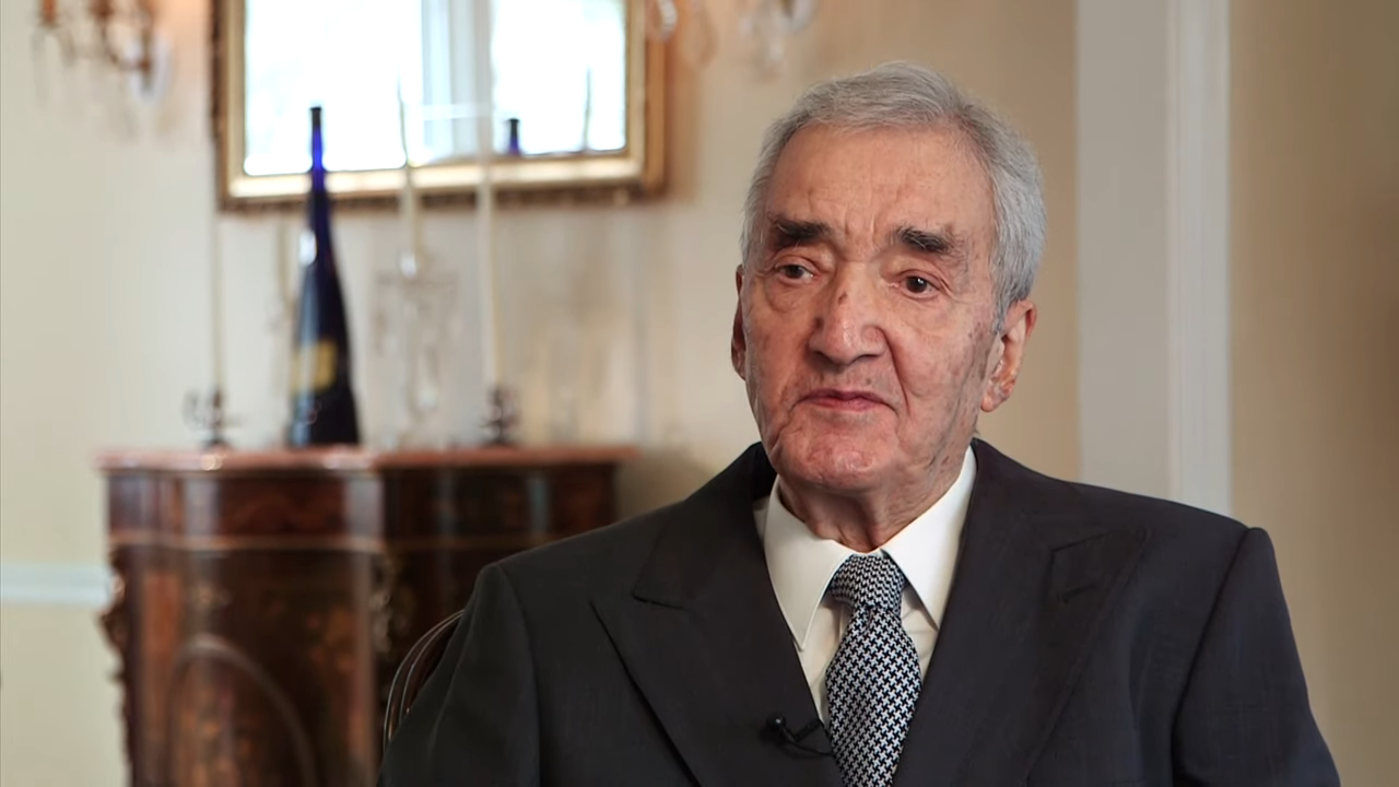 علینقی عالیخانی در برنامهٔ به عبارت دیگر بی‌بی‌سی فارسی